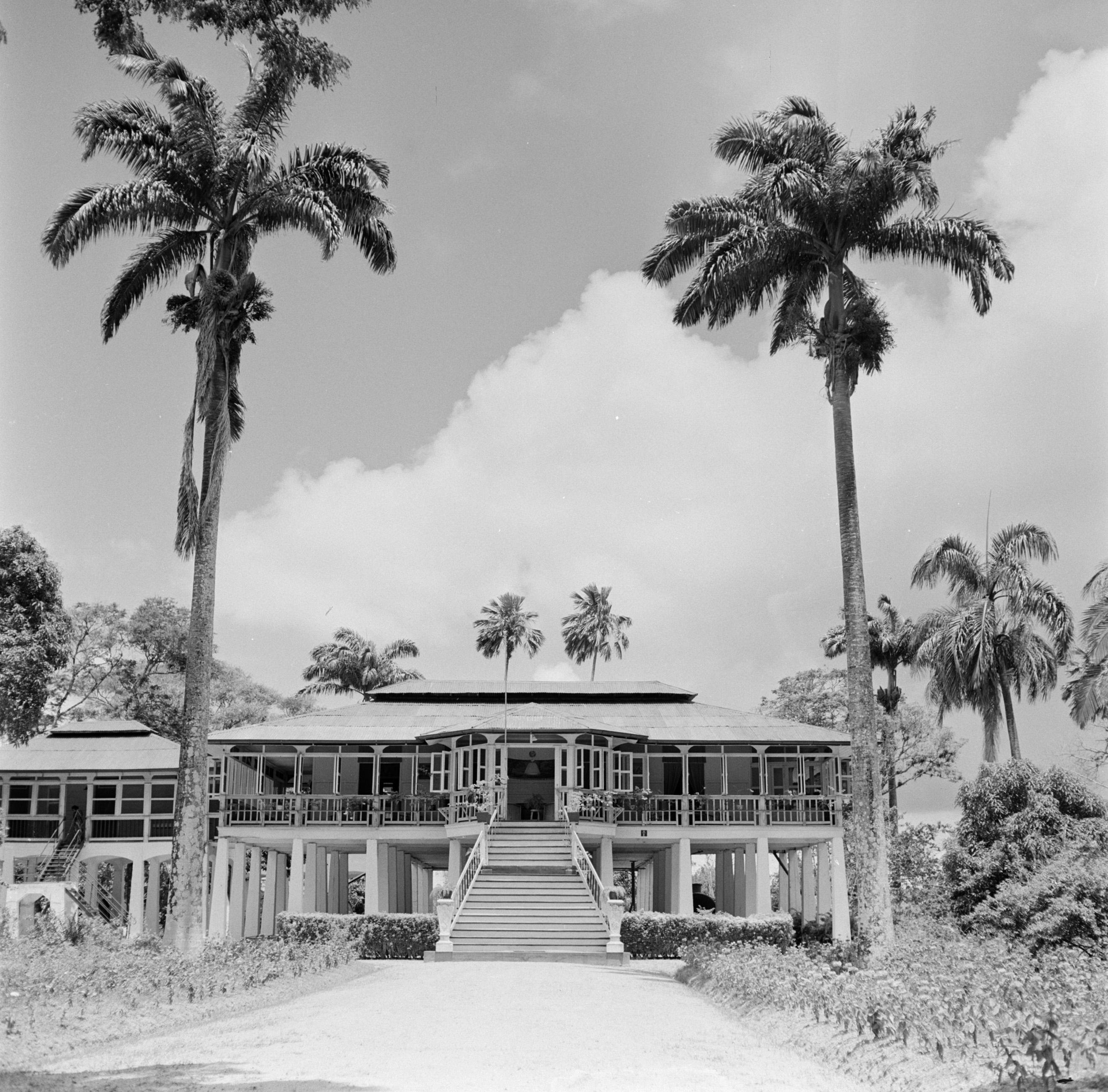 Collectie / Archief : Fotocollectie Van de Poll Reportage / Serie : Nederlandse Antillen en Suriname ten tijde van het koninklijk bezoek van koningin Juliana en prins Bernhard in 1955 Beschrijving : De directeurswoning van suikerfabriek Mariënburg Datum : 1 oktober 1955 Locatie : Suriname Trefwoorden : industrie, suiker, woningen Instellingsnaam : Mariënburg Fotograaf : Poll, Willem van de Auteursrechthebbende : Nationaal Archief Materiaalsoort : Negatief (zwart/wit) Nummer archiefinventaris : bekijk toegang 2.24.14.02 Bestanddeelnummer : 252-2638